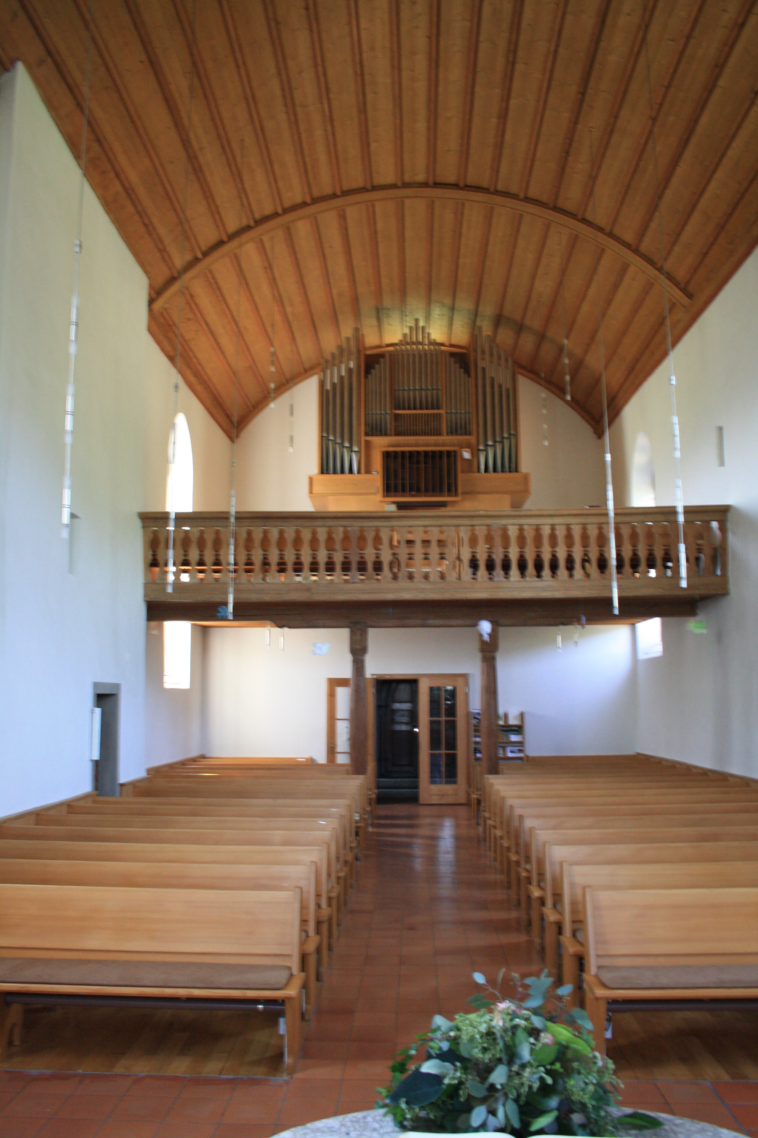 Kirchschiff der ref. Kirche